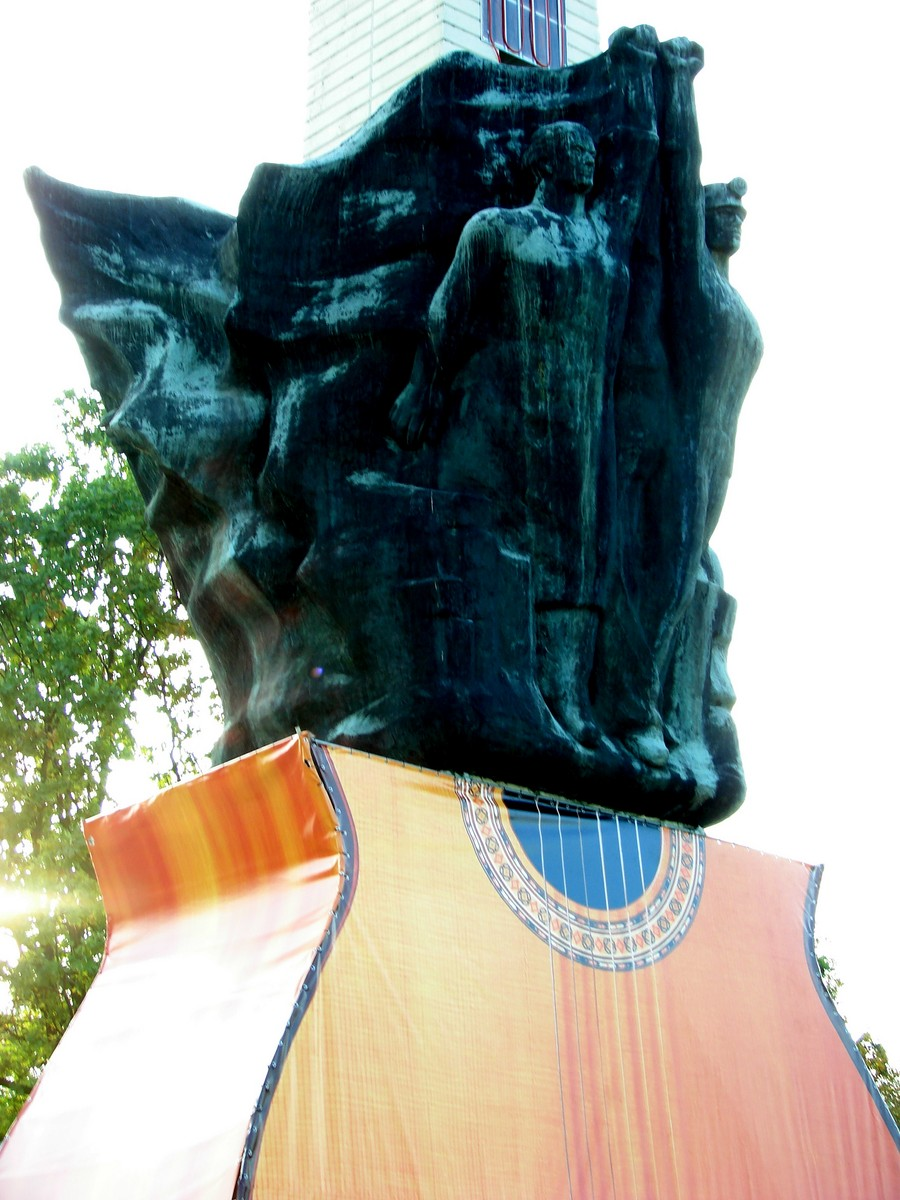 Pomnik Walki i Pracy zwany "Żyrafą" jest wkomponowany w Park Miejski niedaleko Urzędu Miasta.Na fotografii w kształcie gitary.